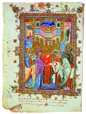 Сретение Господне. Миниатюра из Чашоца. Мастер Торос Рослин (?).1286 г. Киликия (Матен. 979)